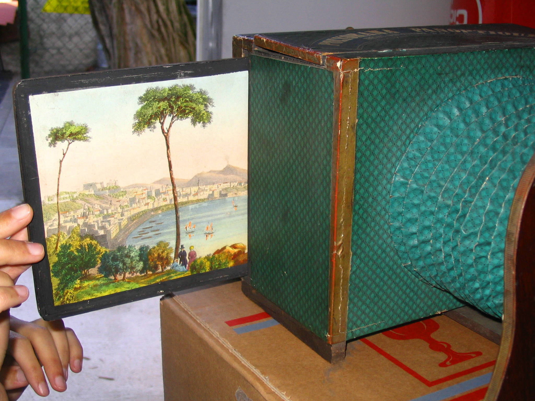 Polyorama panoptique par Louis Daguerre, peinture à transparence, Bry-sur-Marne, France